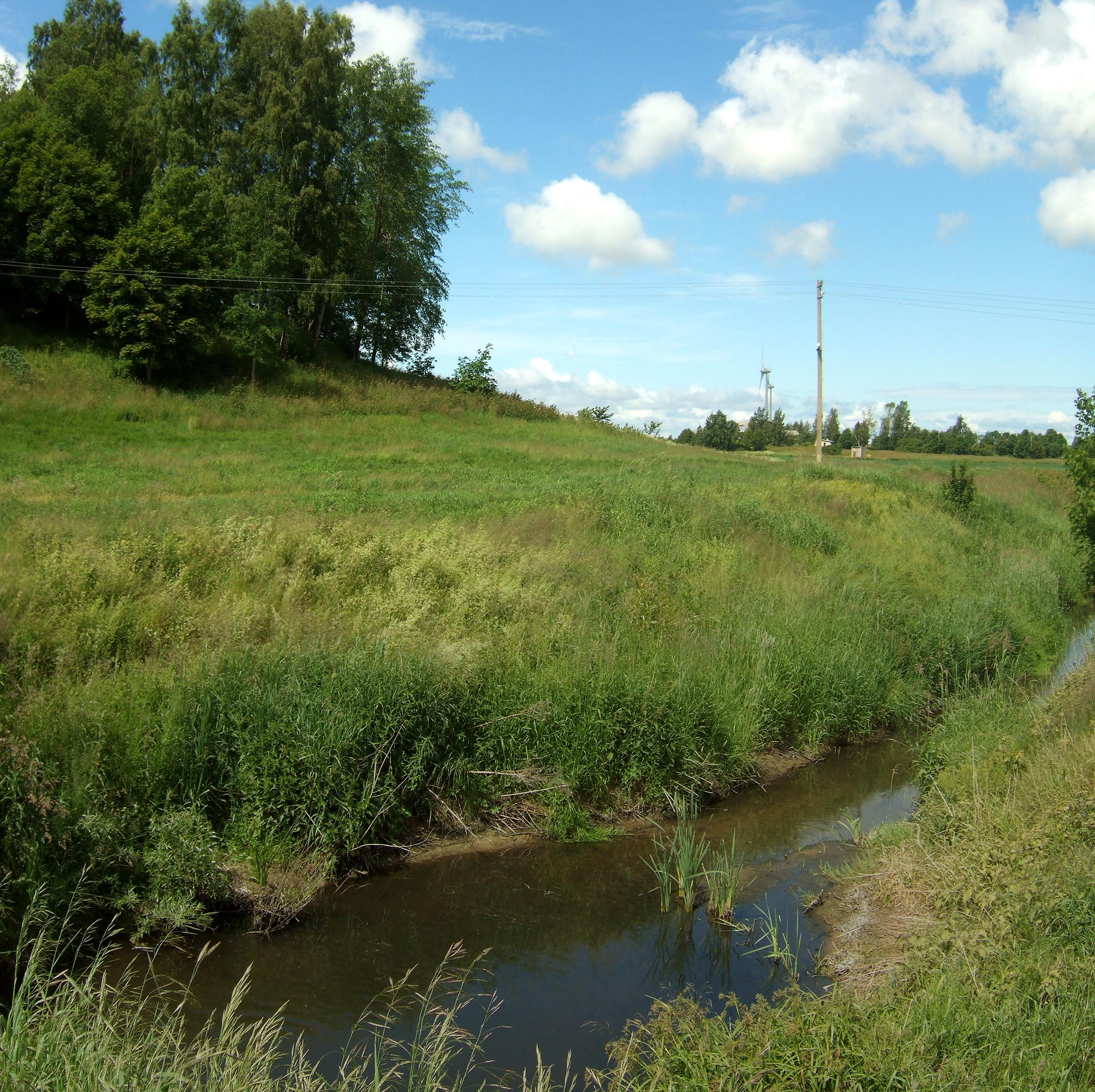 Upelis Žiba prie Rūdaičių pilialalnio (kairėje)